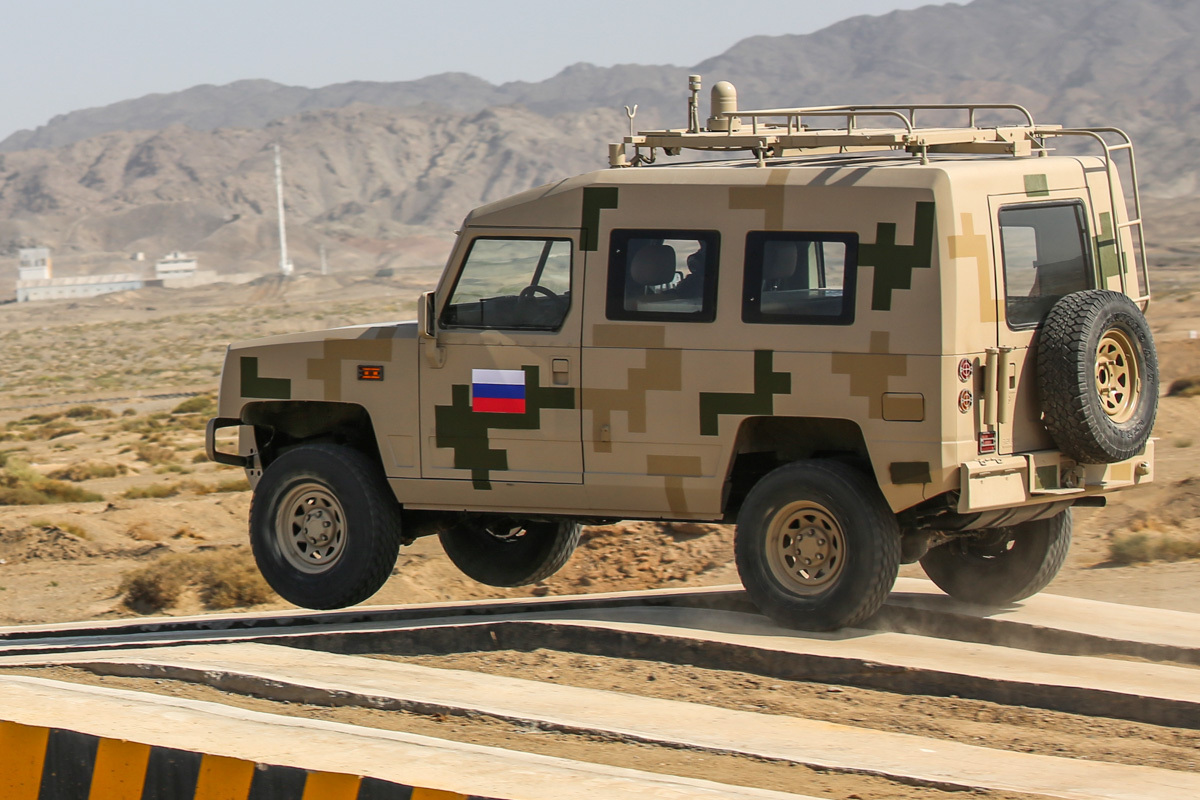 Соревнования международного конкурса «Безопасная среда» Армейских международных игр-2017 (полигон Корла, КНР)